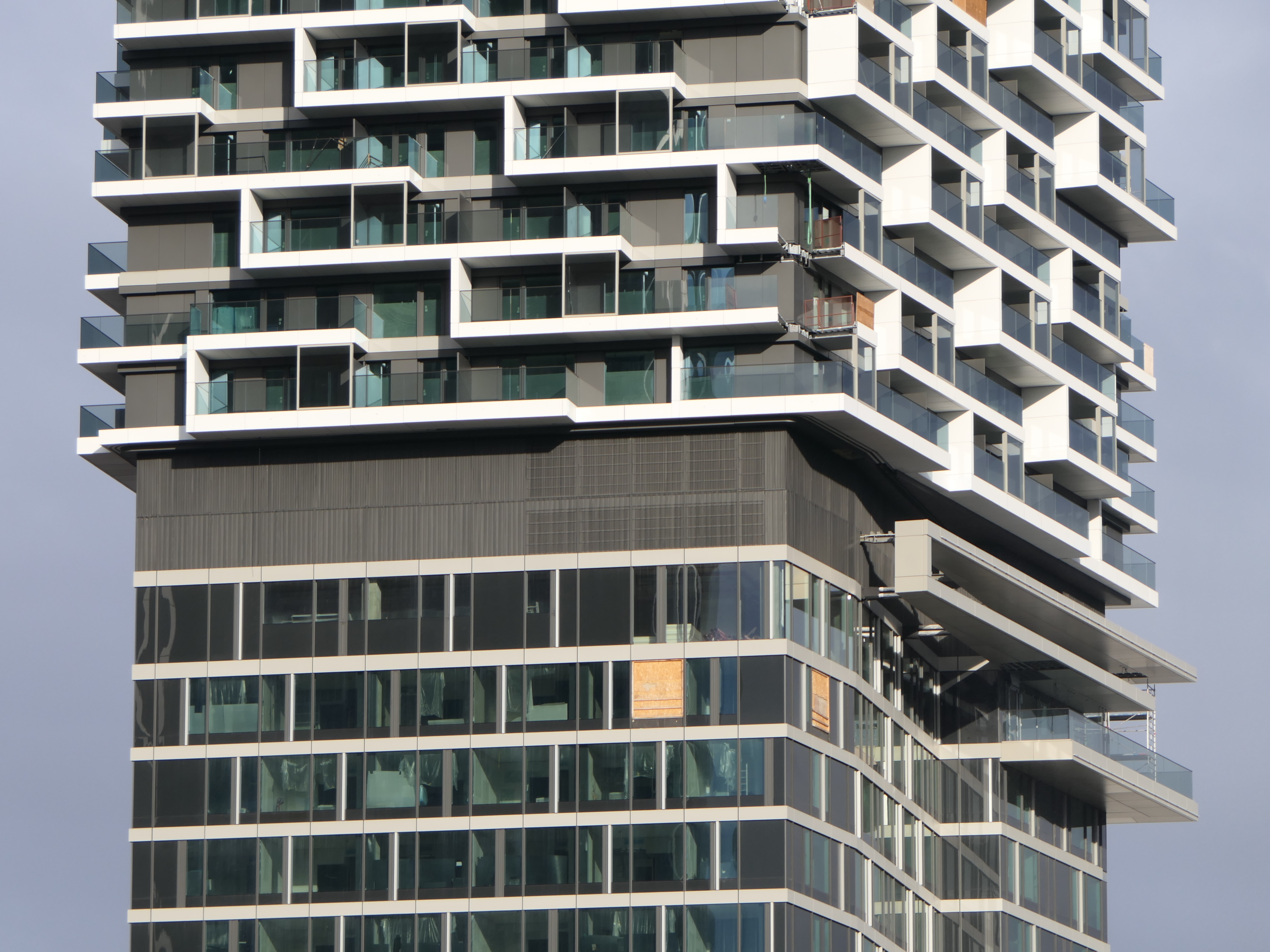 Detailansicht der verschiedenen Fassadenelemente am One Forty West in Frankfurt im Januar 2020.